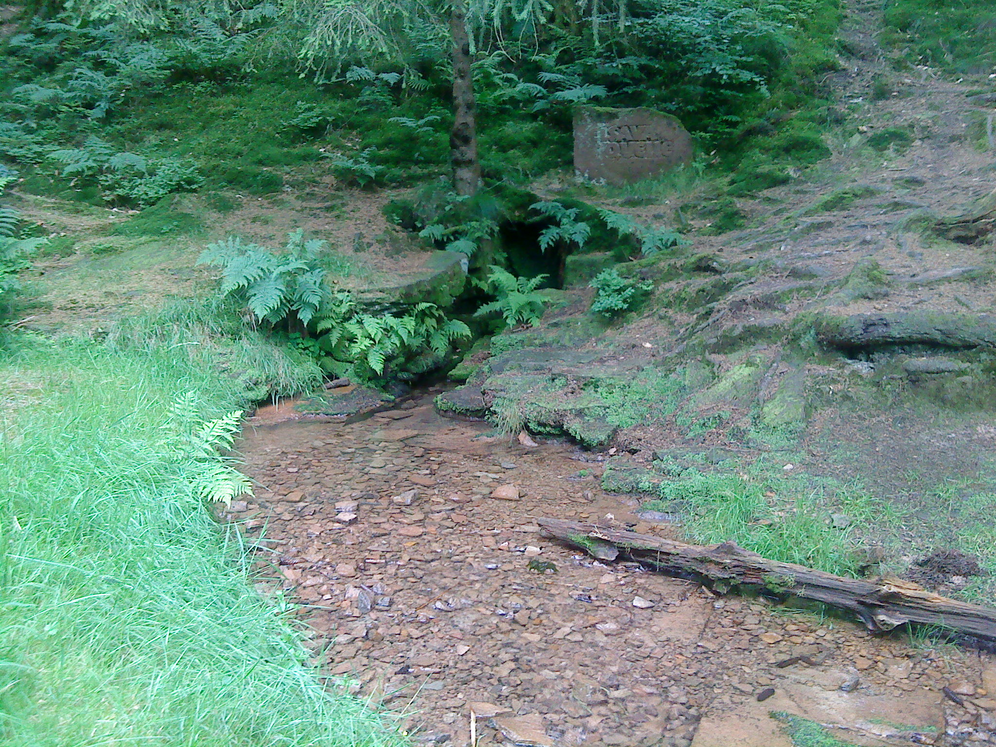 Die Elsavaquelle östlich von Mespelbrunn-Hessenthal